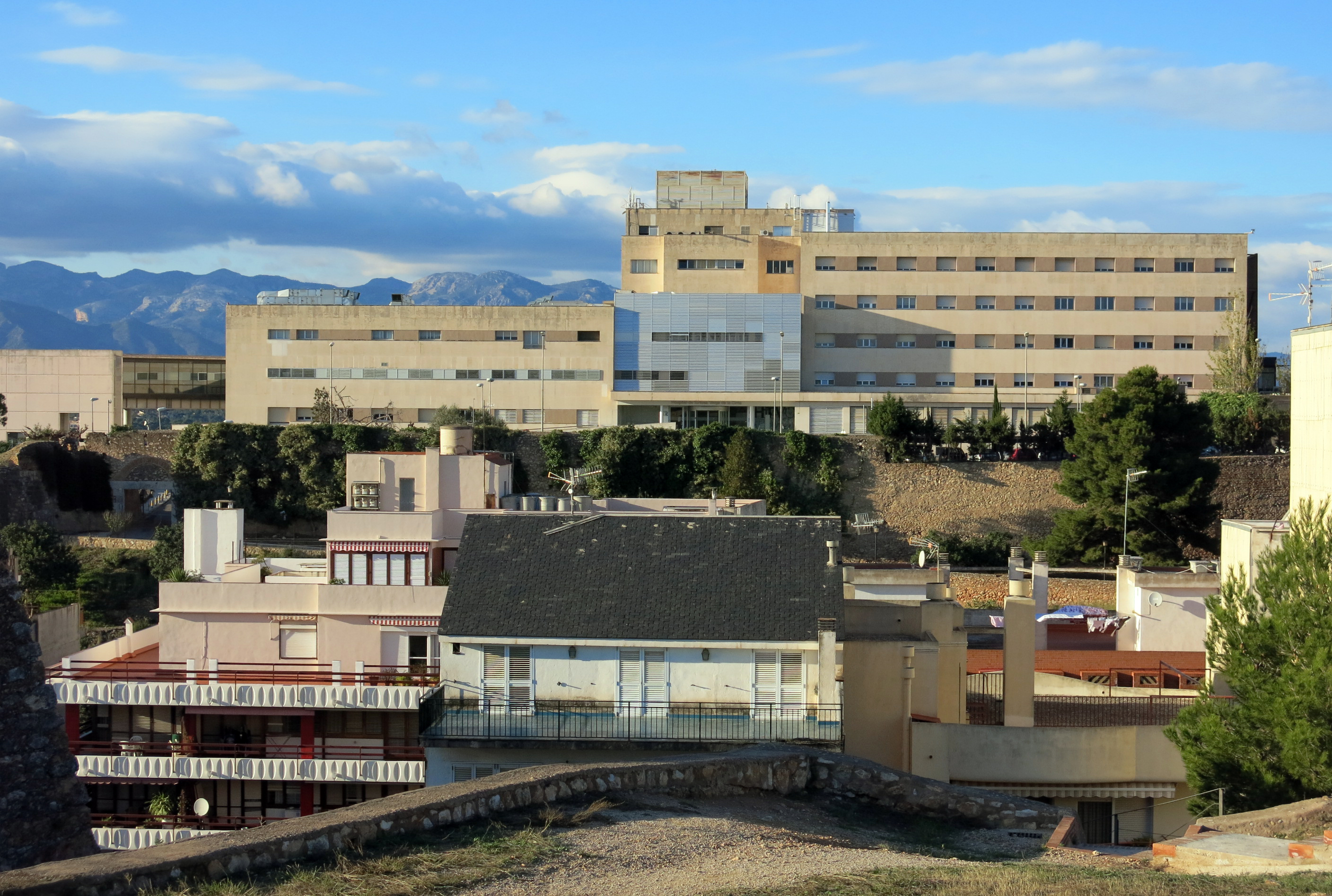 Residència Sanitària Verge de la Cinta (Tortosa)